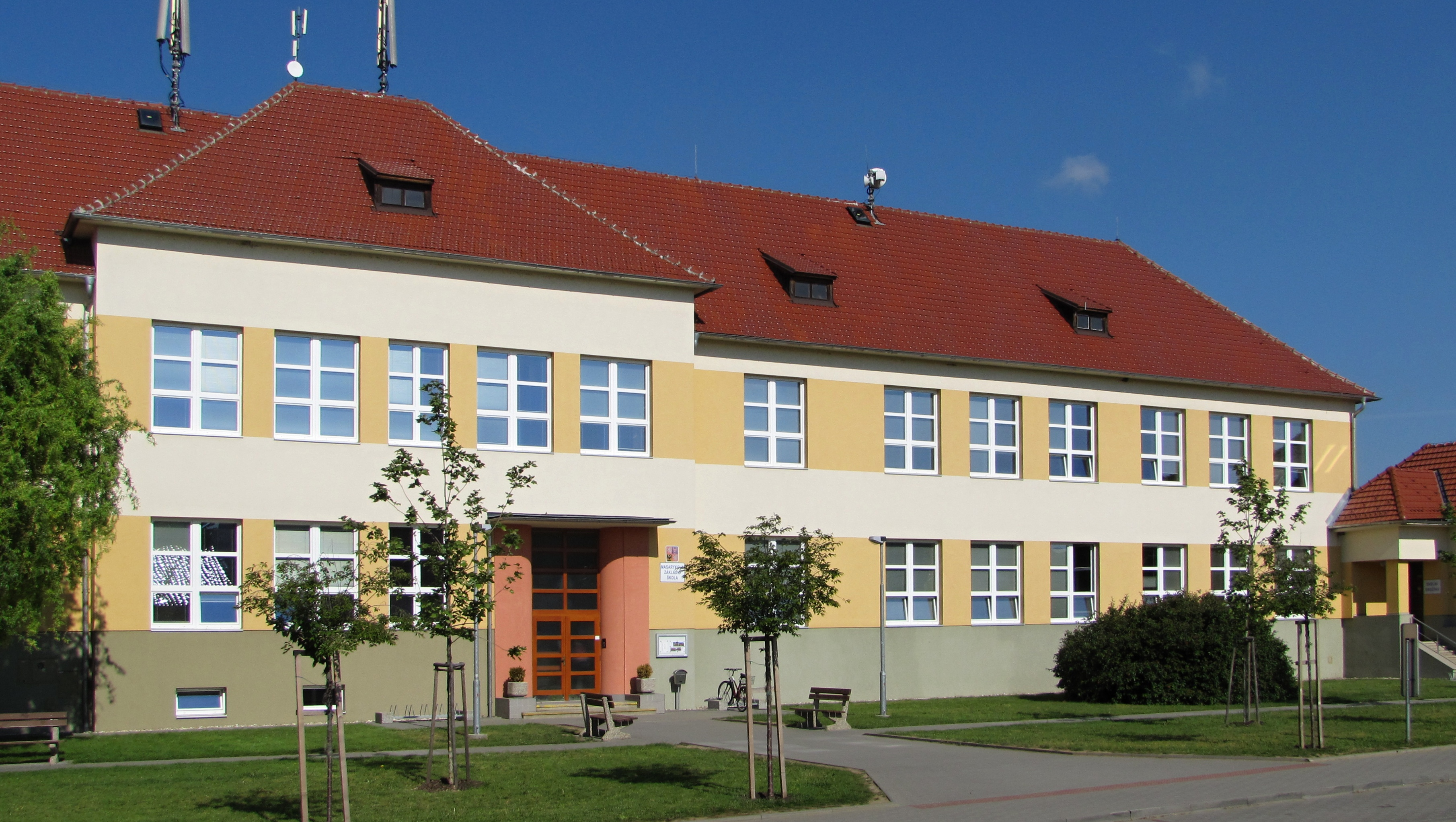 Základní škola ve Vracově